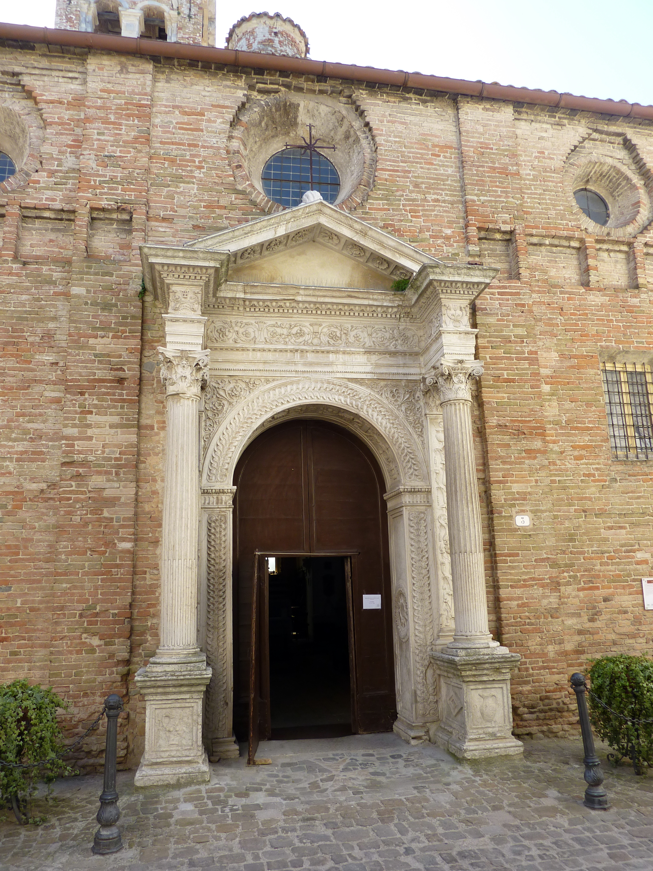 Facciata esterna e portale scolpito in pietra bianca attribuito a Raffaello Sanzio, Chiesa di Santa Maria Novella di Orciano di Pesaro.